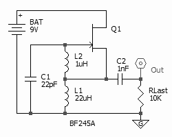 ECO Oszillator mit FET